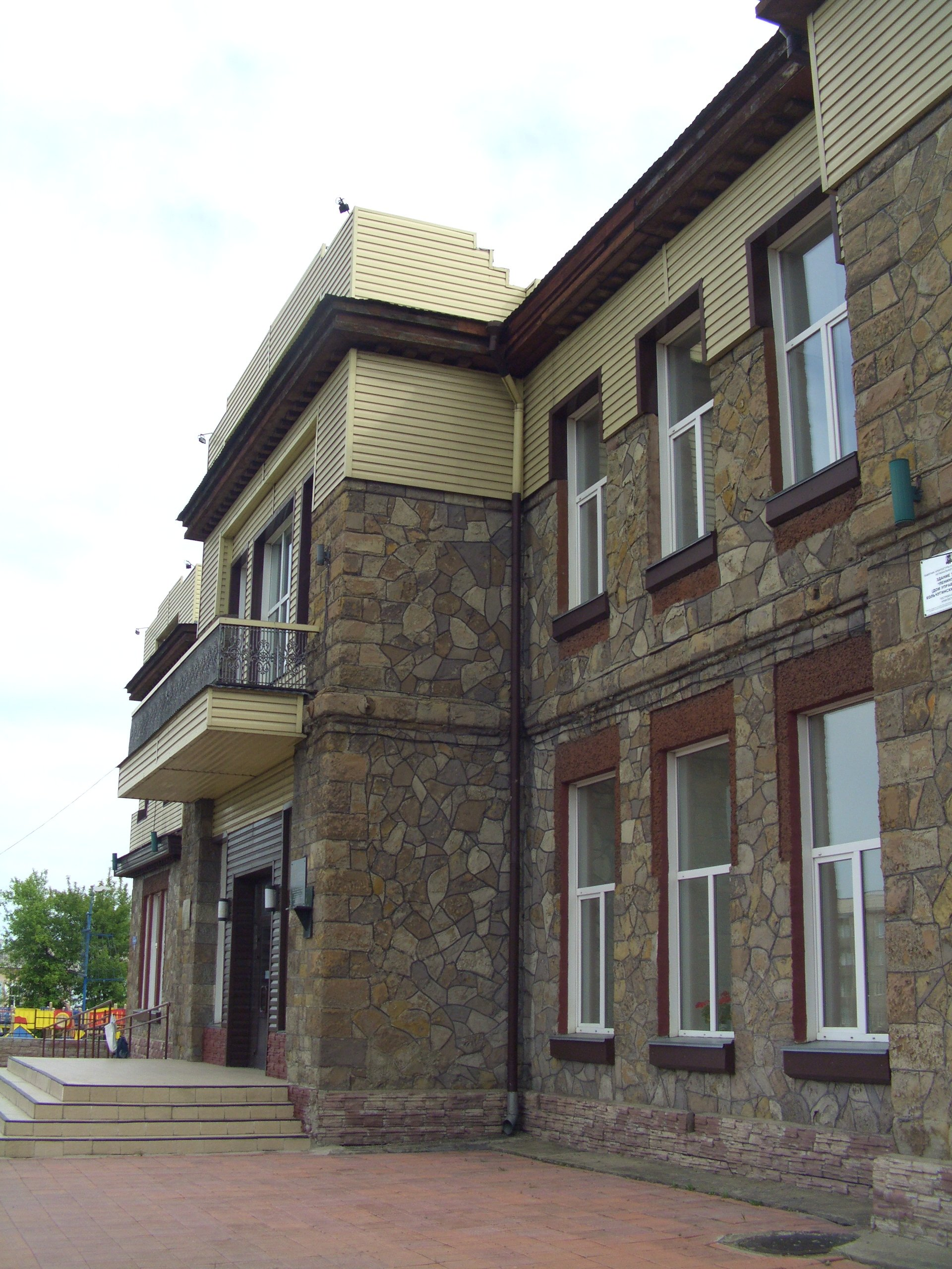 Здание треста «Ленинскуголь»: улица Горького, 16, Ленинск-Кузнецкий, Кемеровская область